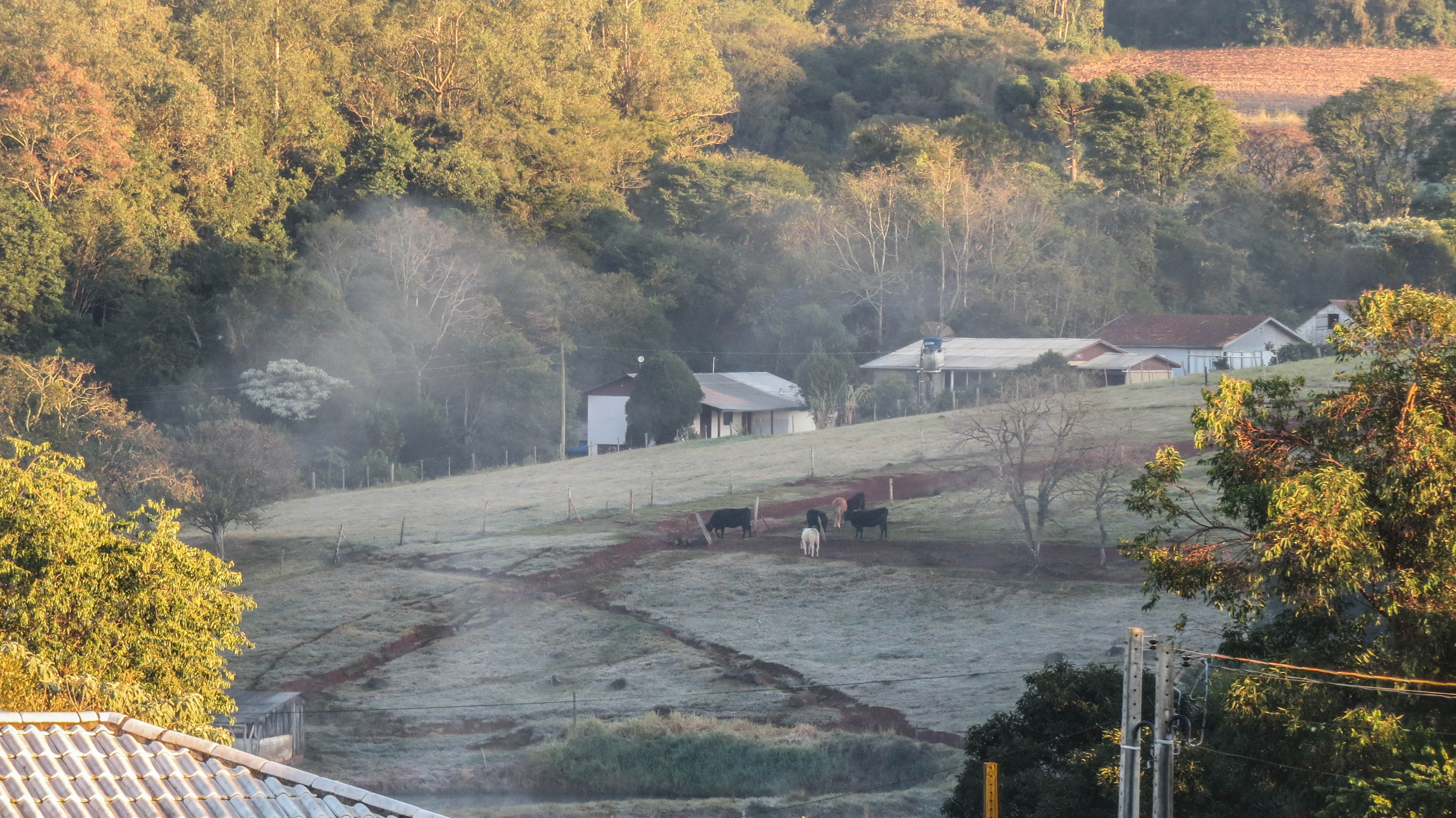 Português do Brasil: Geada em Iporã do Oeste